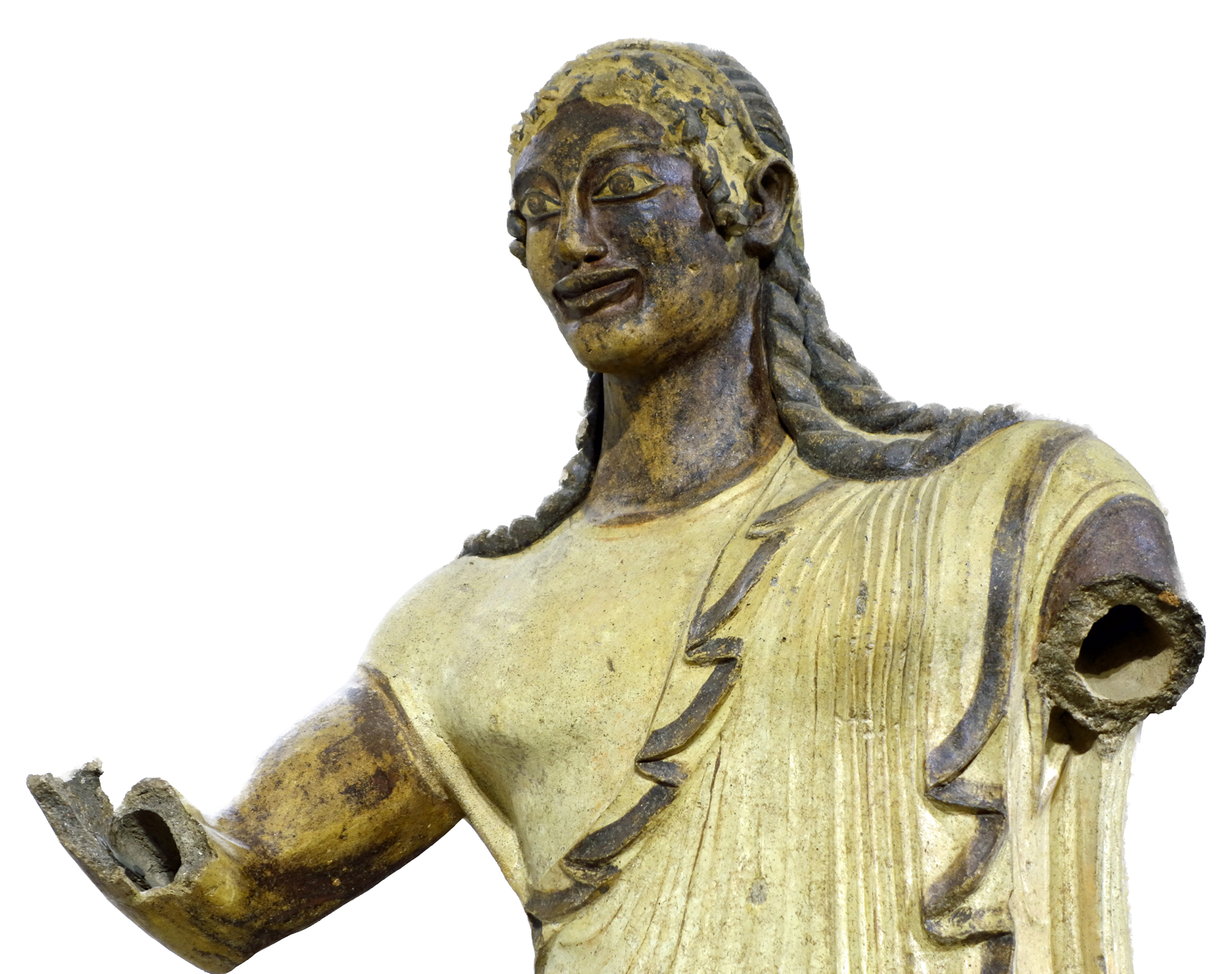 Apollon de Véies, -510 / -500. Musée national étrusque de la villa Giulia, Rome.